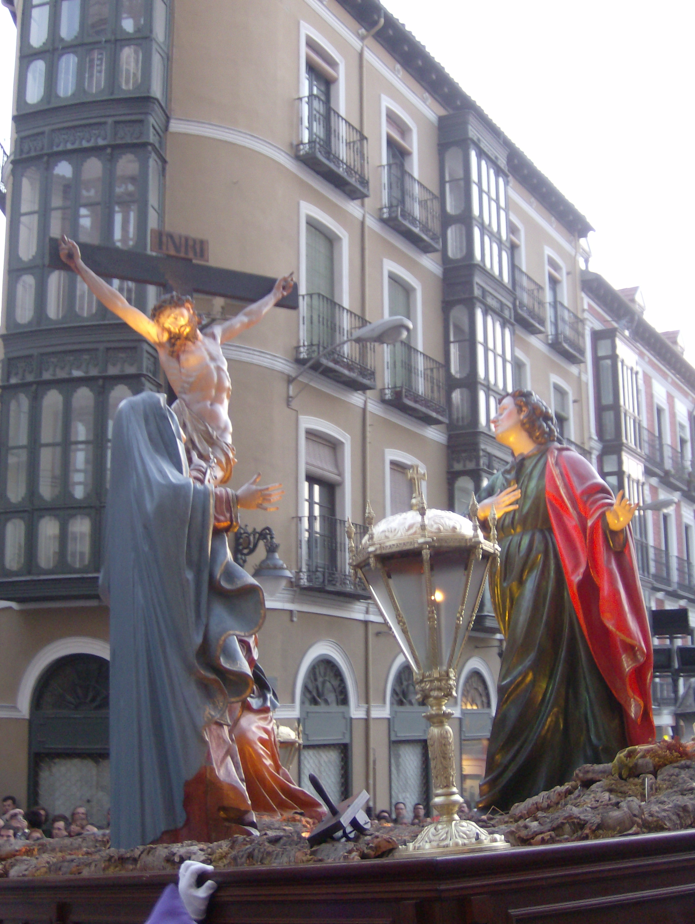 El Monte Calvario (Pedro de Sierra)